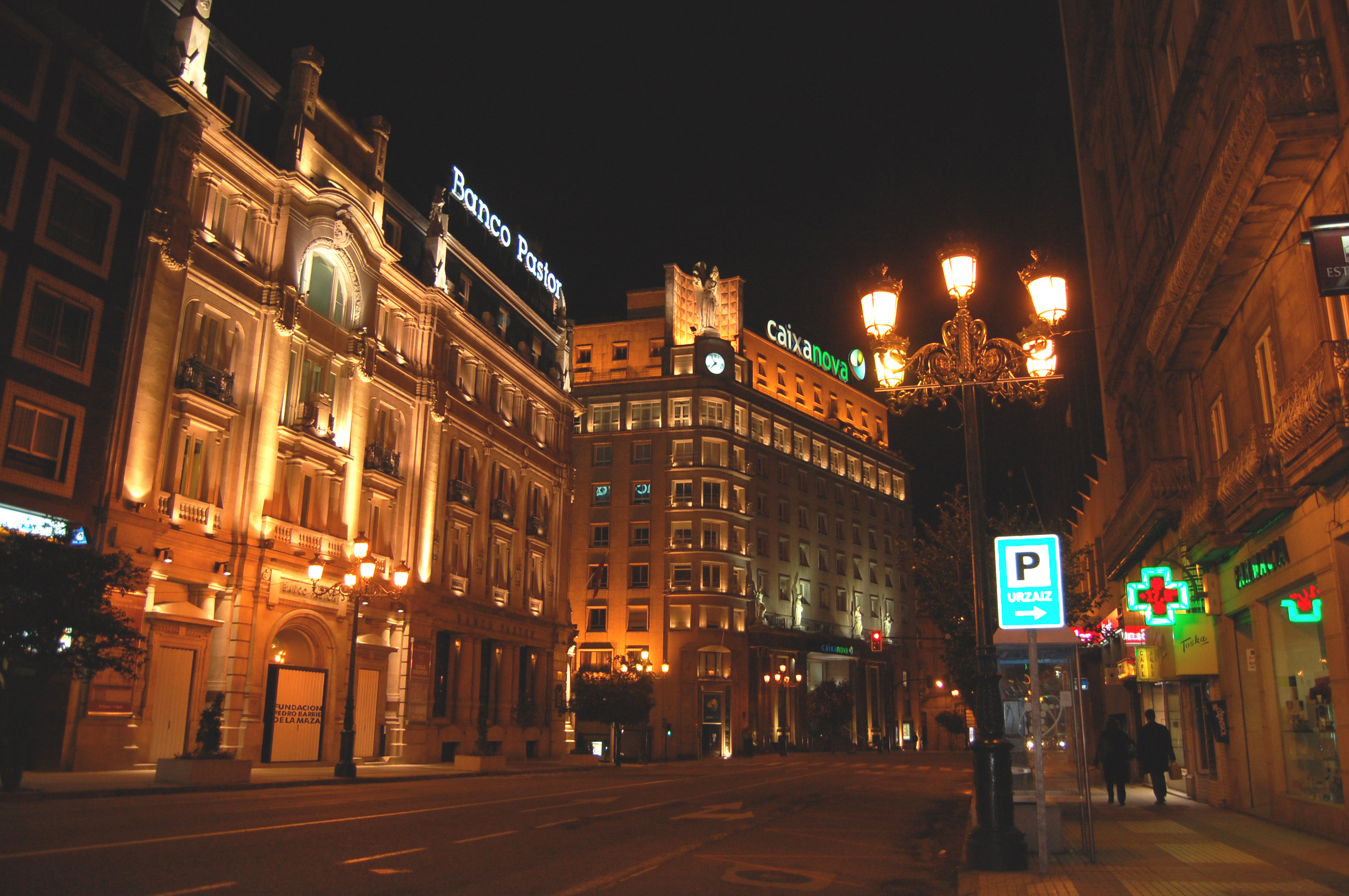 Sedes dos bancos Caixanova e Pastor em Vigo.